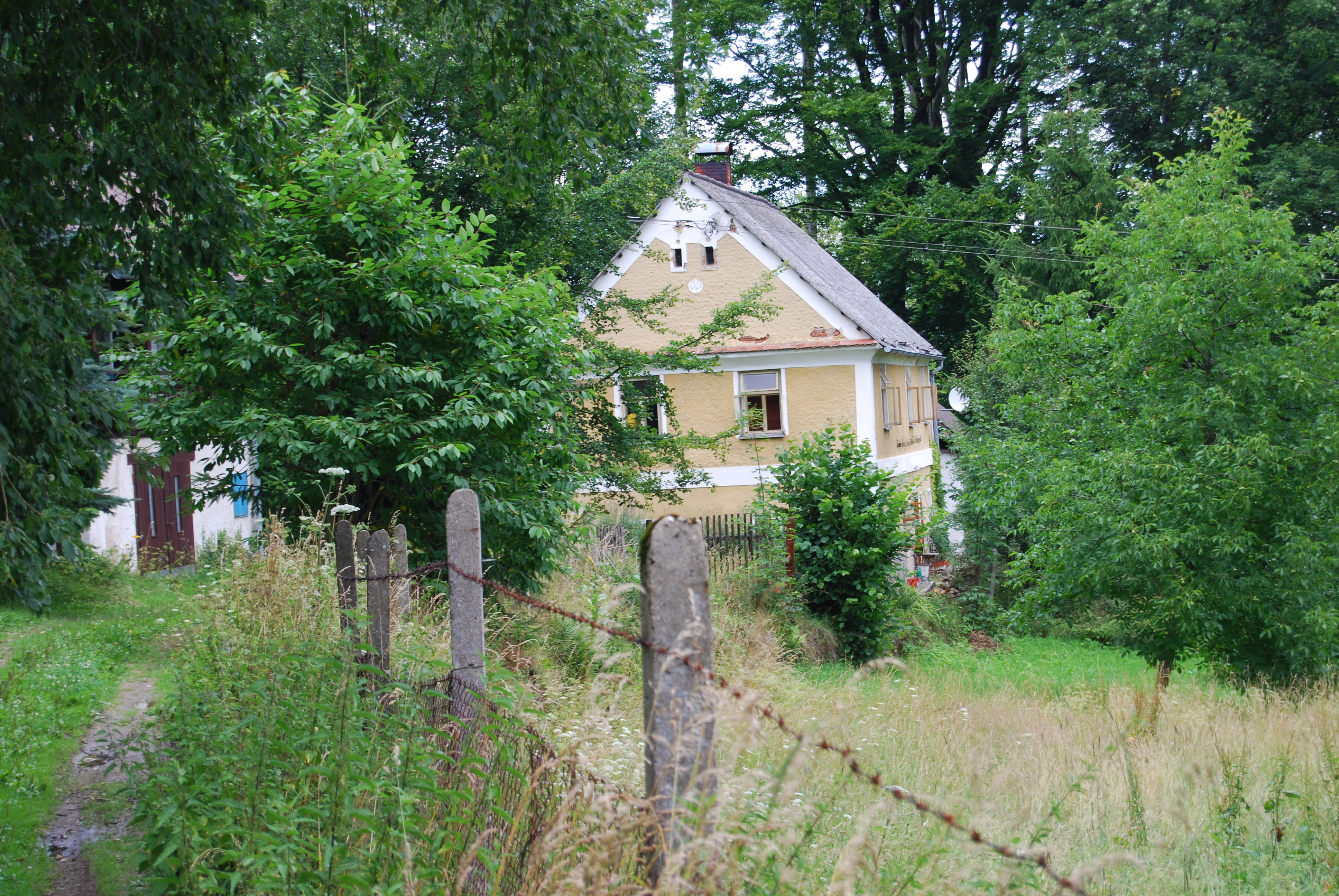 Stavení na samotě. Branišov je část obce Chyšky v okrese Písek. Česká republika.